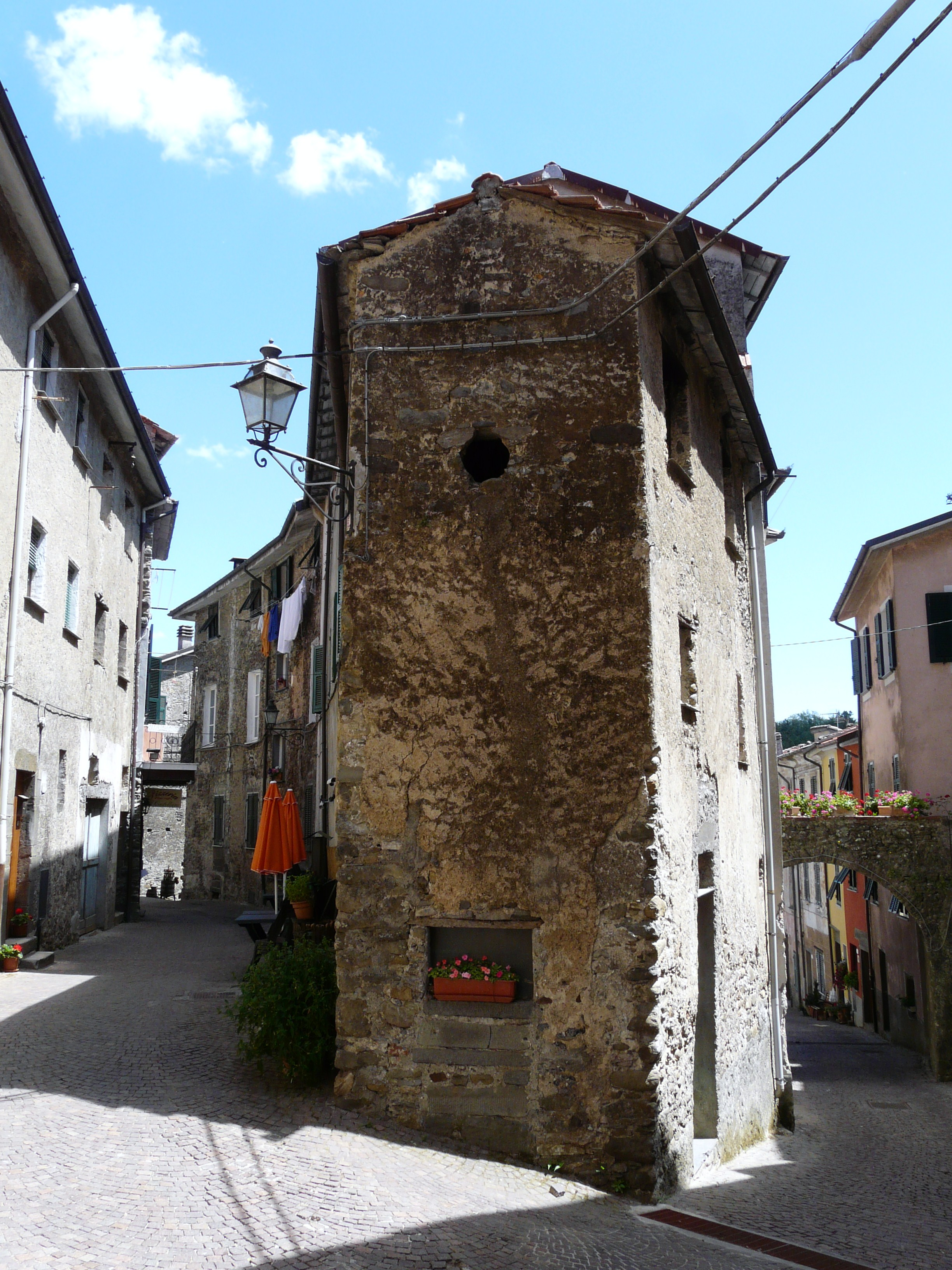 Centro storico, Pignone, Liguria, Italia